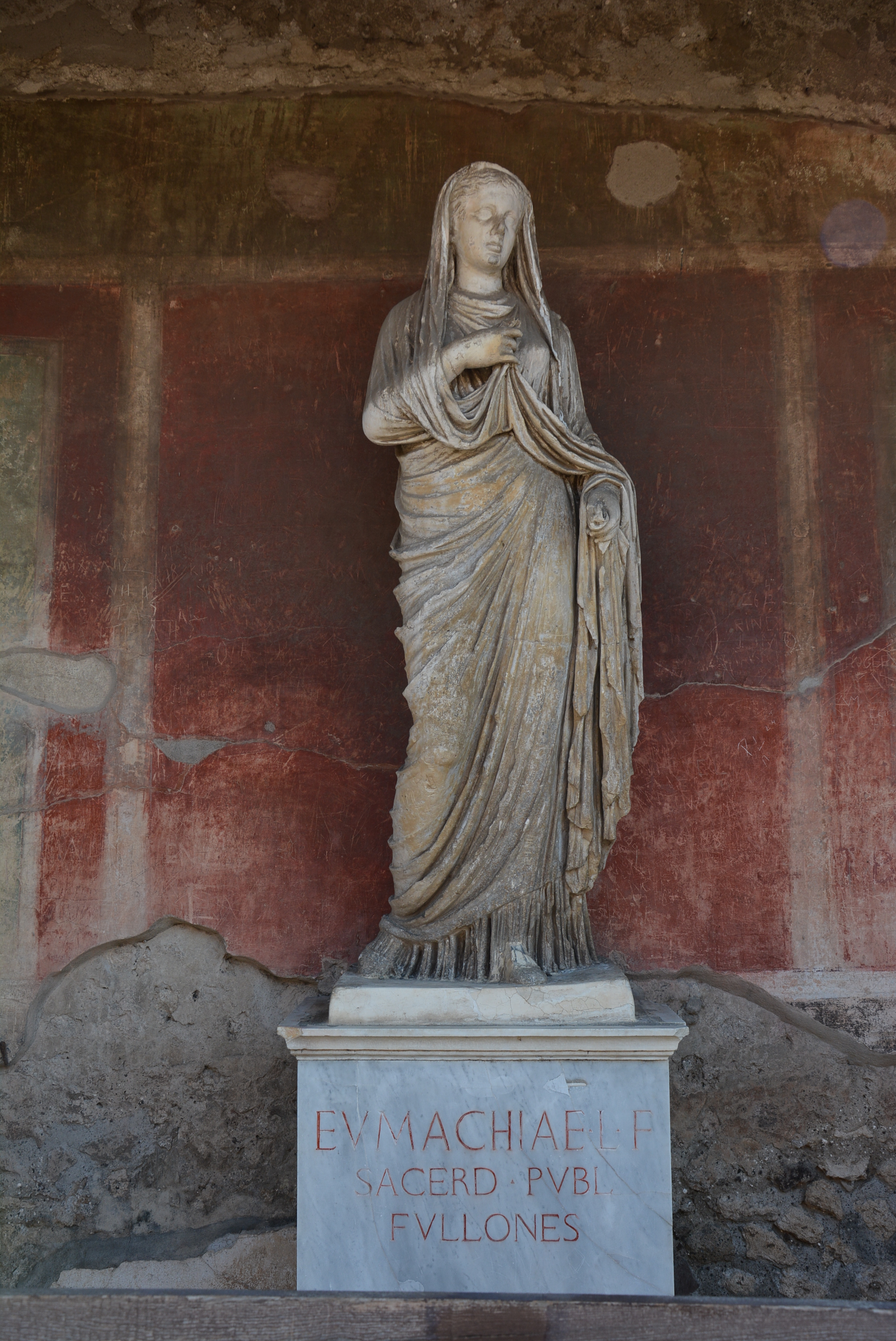 Edificio di Eumachia - MIBACT This is a photo of a monument which is part of cultural heritage of Italy.